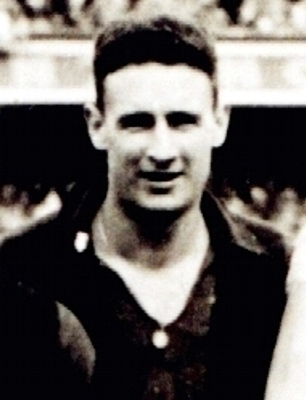 Vicente Cantatore en su época de futbolista.